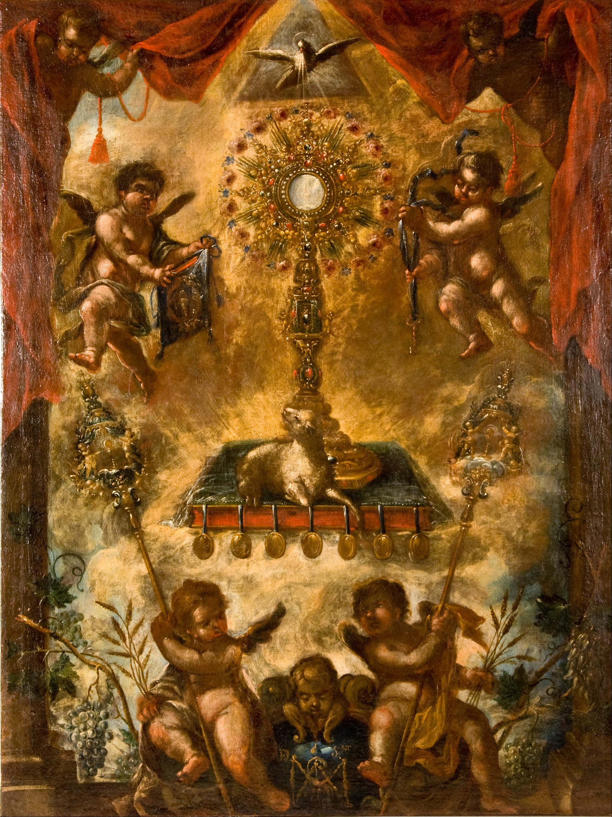 La obra es una alegoría del sacramento cristiano de la Eucaristía.